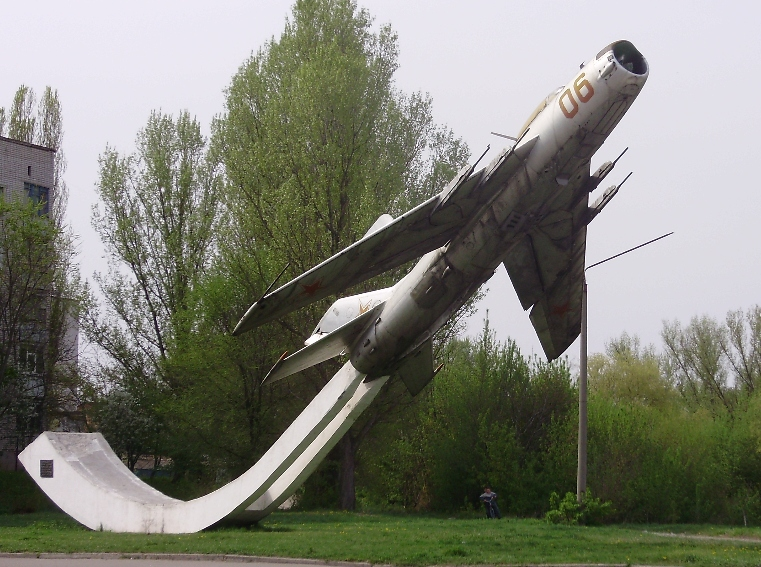 Памятник 10-й гвардейской воздушно-десантной дивизии